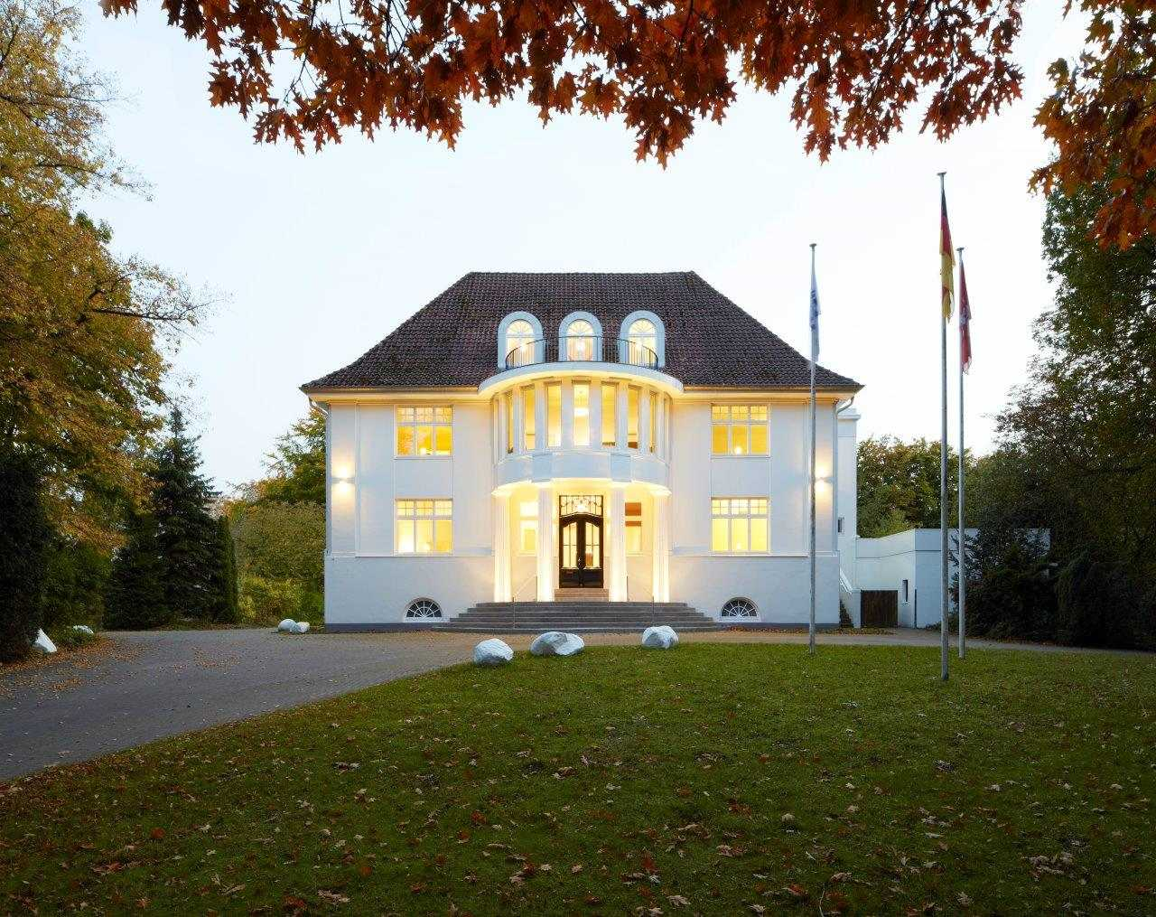 Hauptgebäude des Haus Rissen Hamburg – Internationales Institut für Politik und Wirtschaft in Hamburg-Rissen.